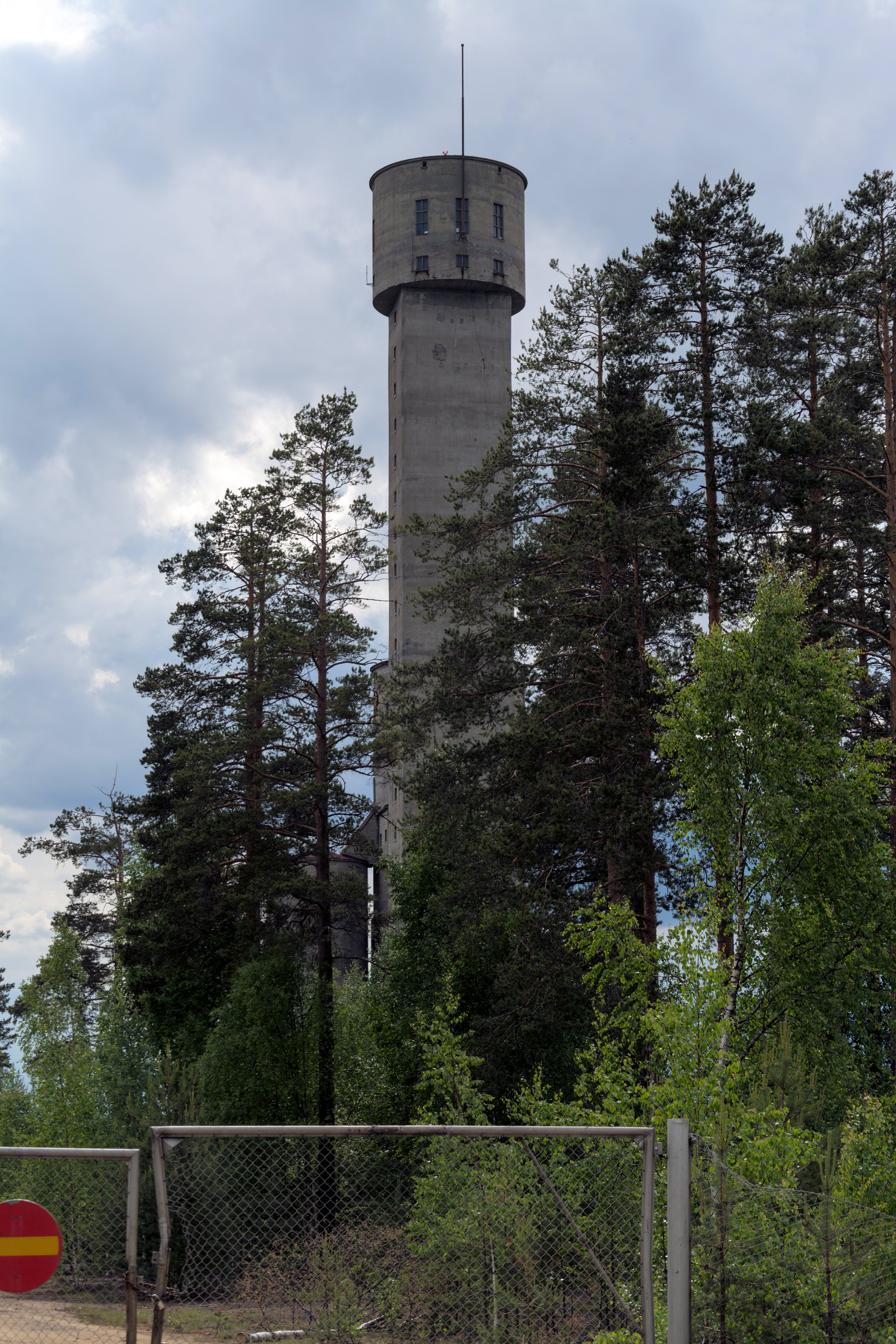 Outokummun kaivostorni,Lipputankoineen, Jota moni luulee Ukkosenjohdattimeksi.